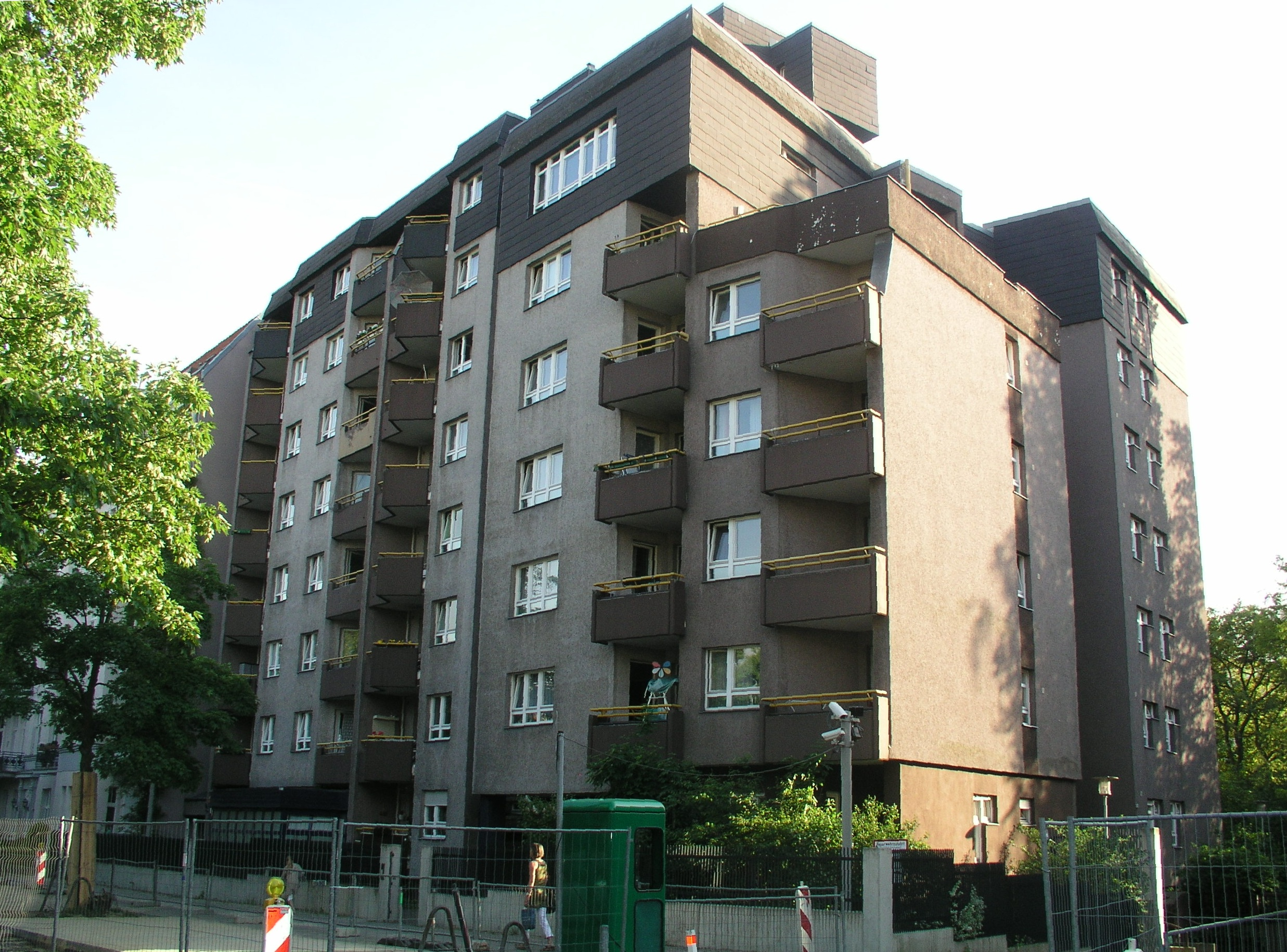 Jüdisches Seniorenheim mit Synagoge in Berlin-Charlottenburg, Herbartstraße